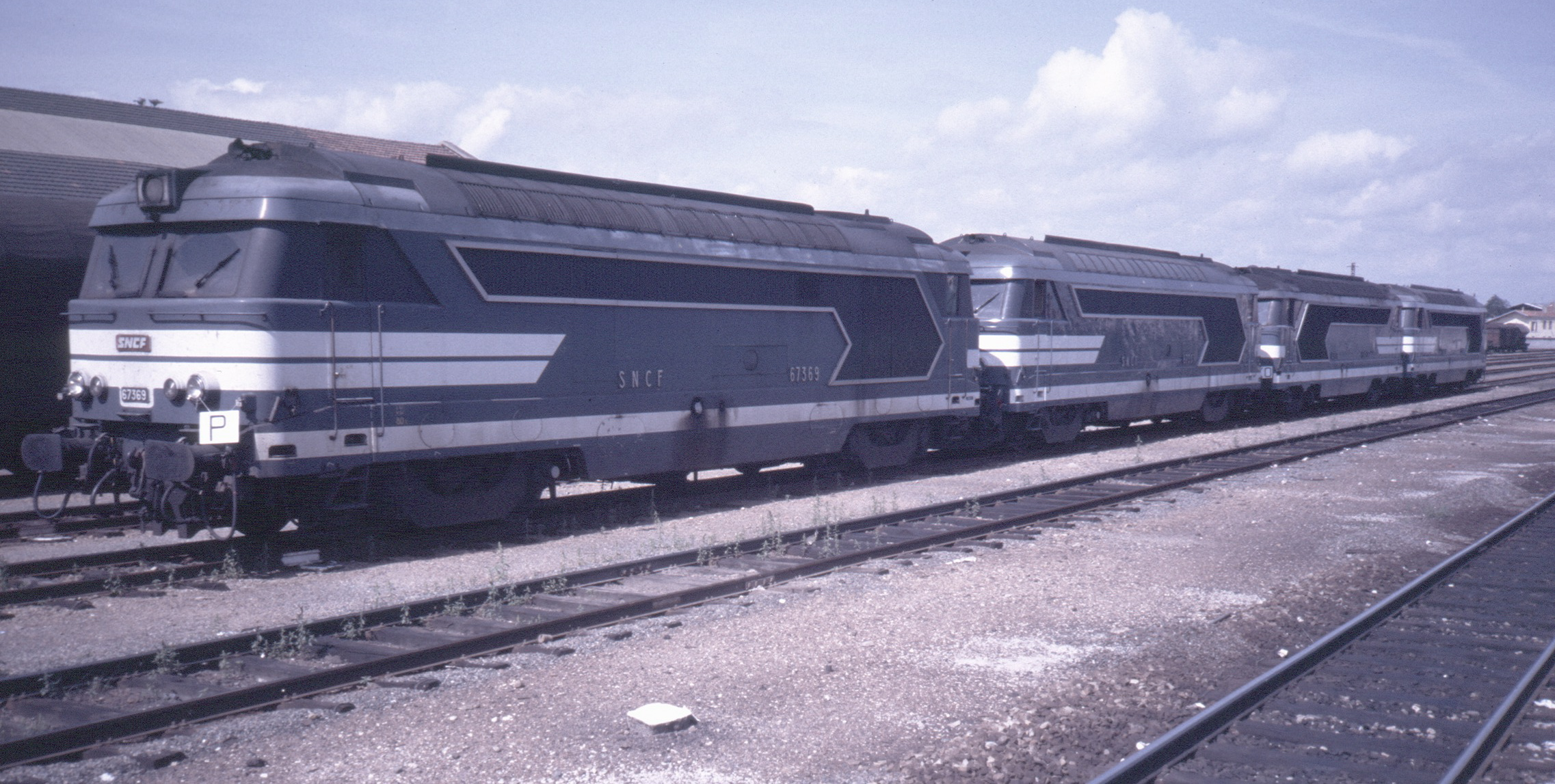 BB 67369 en gare de Roanne